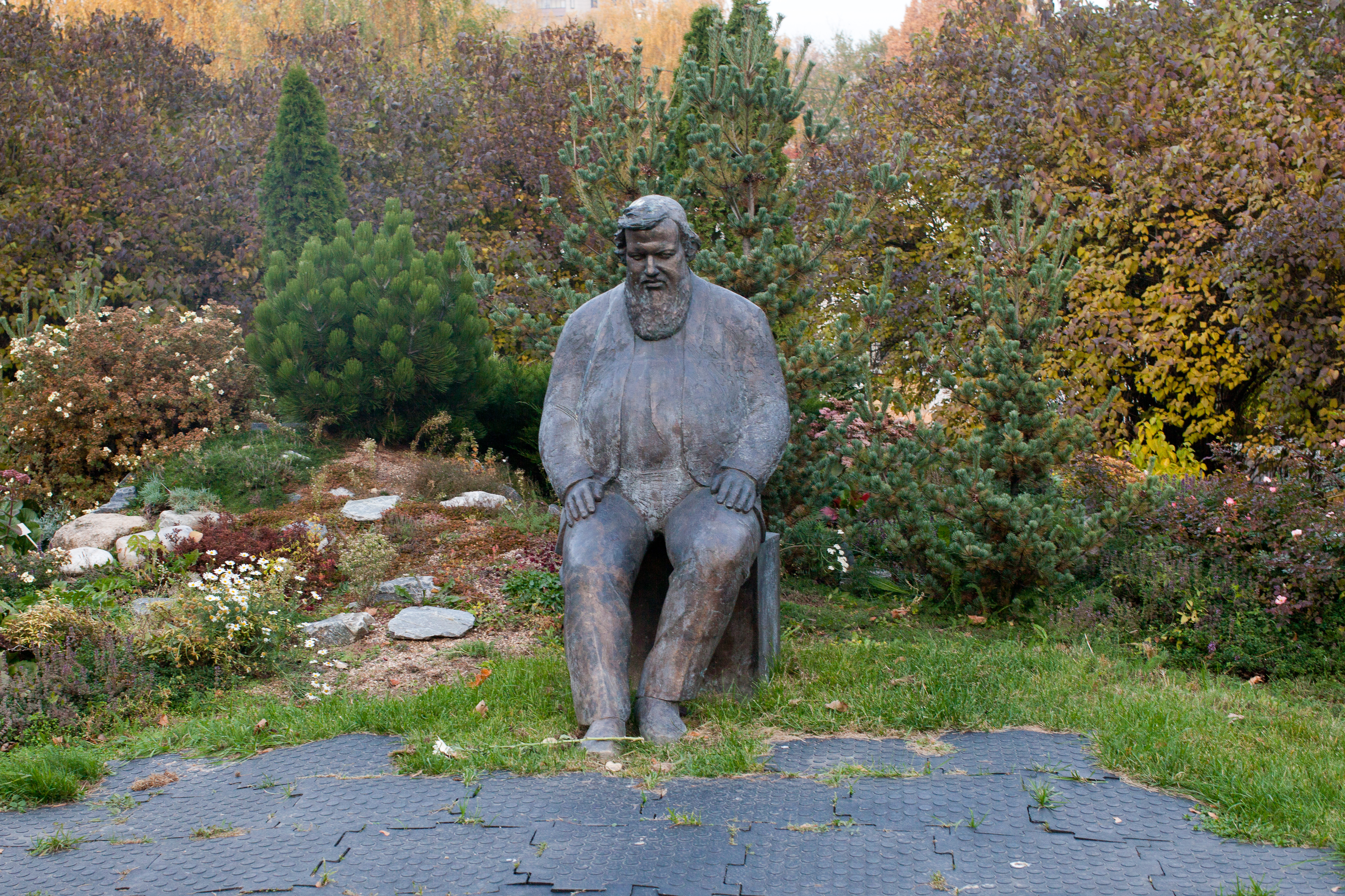 Памятник основателю московской школы-интерната "Интеллектуал" Евгению Маркелову во дворе школы